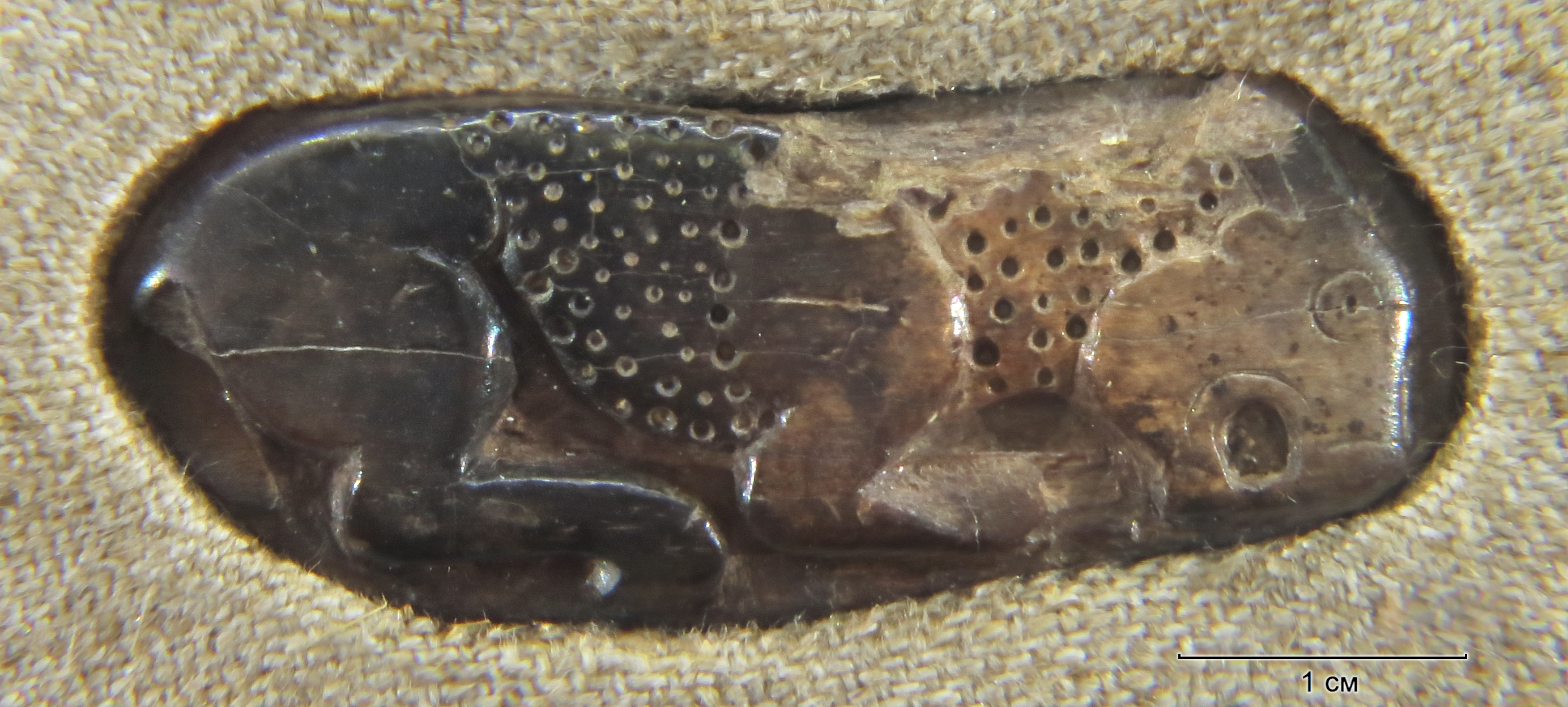 Знахідка з Хотівського городища скіфської доби в Археологічному музеї (Київ). Підпис: "Фрагмент рогової пластини із зображенням хижака в скіфському "звіриному стилі". Розкопки Є. О. Петровської, 1966 р.". Згідно зі статтею Петровської та іншими науковими роботами, фрагмент є кістяним і знайдений в 1965 р. на глибині 1,5 м від сучасної поверхні, вище підлоги на 0,5 м. Довжина 4,7 см, зворотній бік без зображення. Див. Петровська Є. О. Ранньоскіфські пам’ятки на південній околиці Києва / В кн.: Археологія. — К.: Наукова думка, 1970. — Т. XXIV. — С. 135, Максимов Е. В., Петровская Е. А. Древности скифского времени Киевского Поднепровья / Под ред. Р. В. Терпиловского. — Полтава, 2008. С. 52-53. — 126 с.